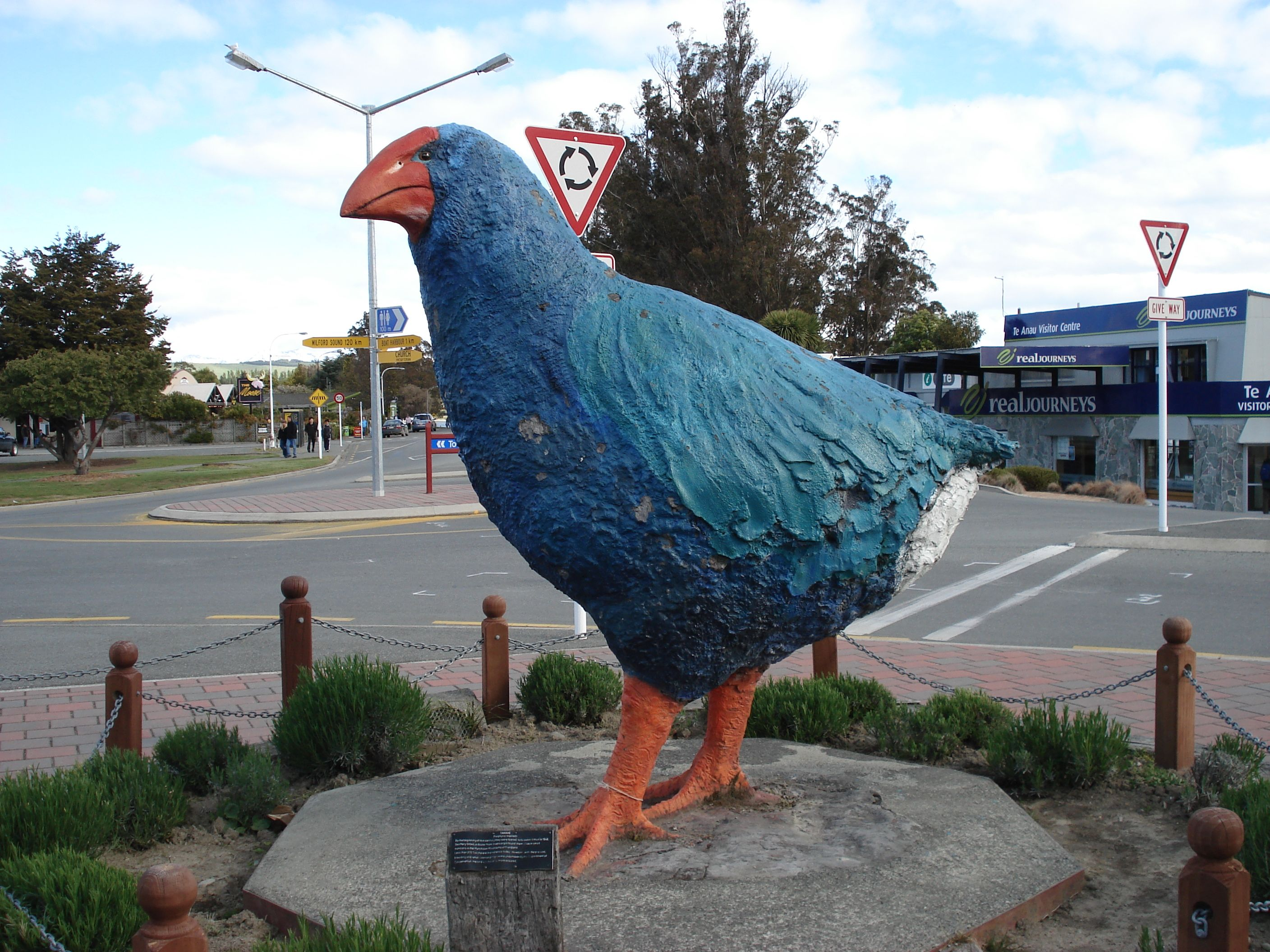 Takahe statue in Te Anau